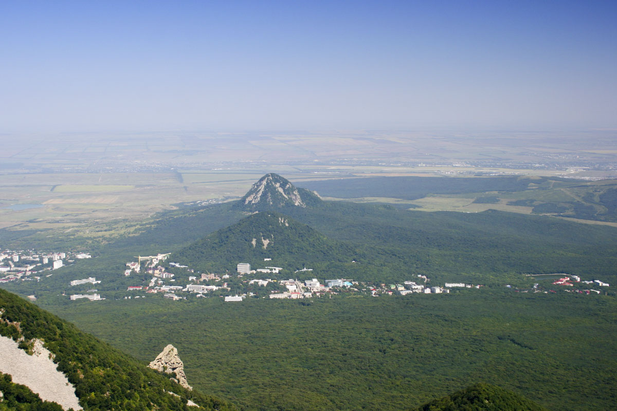 Вид на курортную часть города с горы Бештау